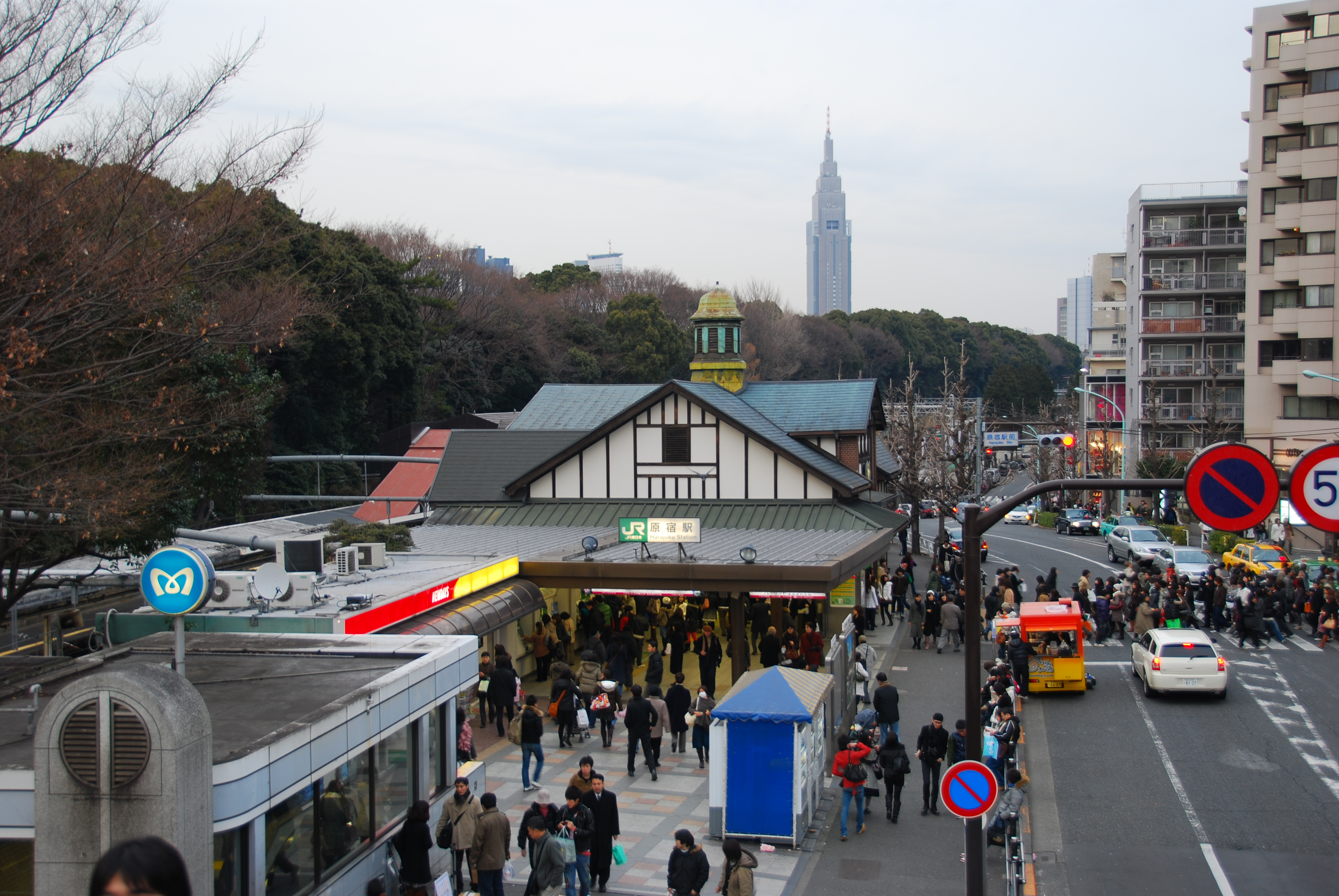 東京都原宿車站